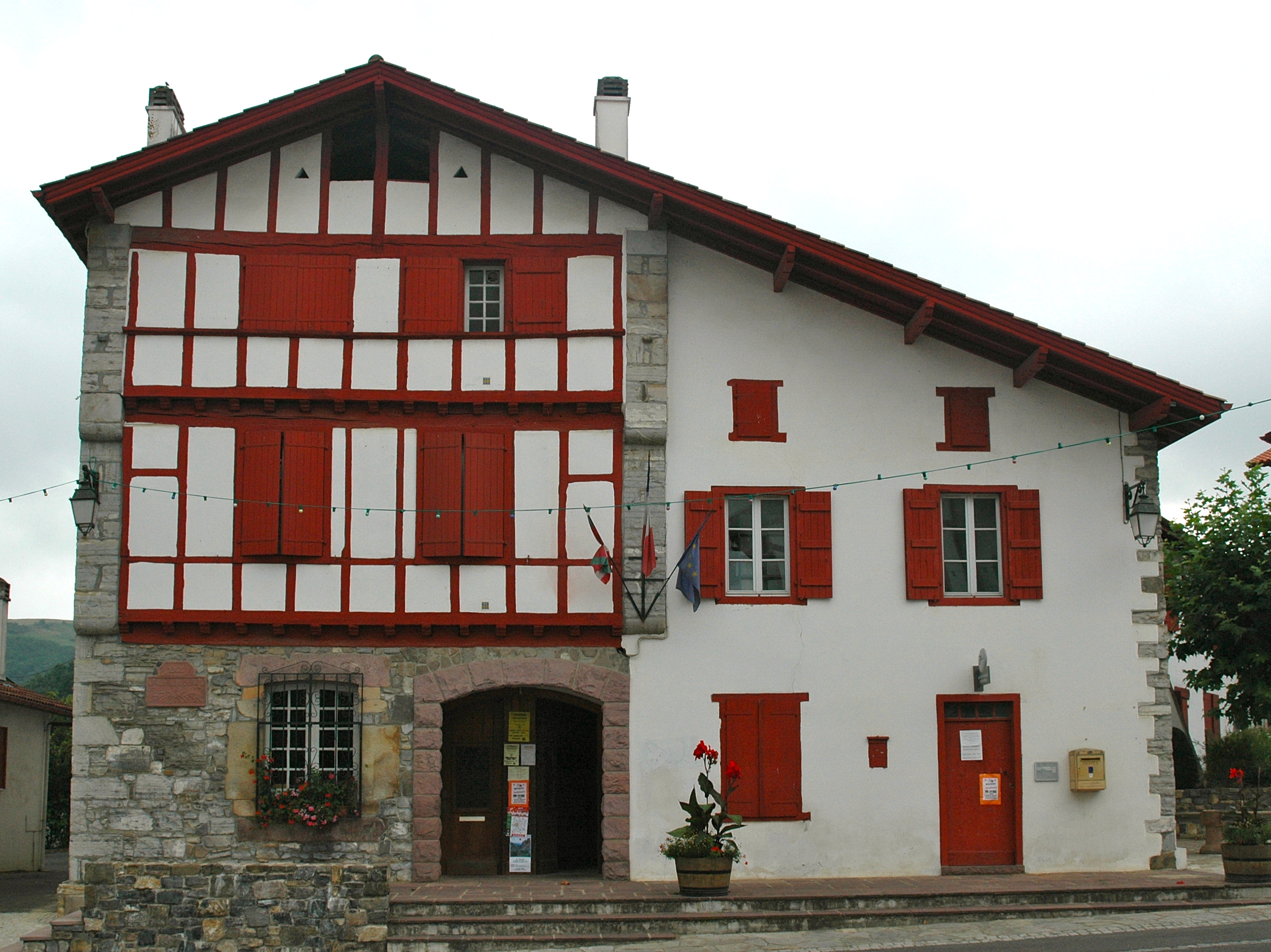 Souraïde, la mairie. Photo prise le 27/07/06 par Harrieta171